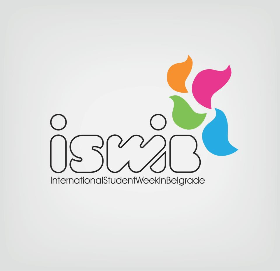 Српски (ћирилица): Лого фестивала 2014. године